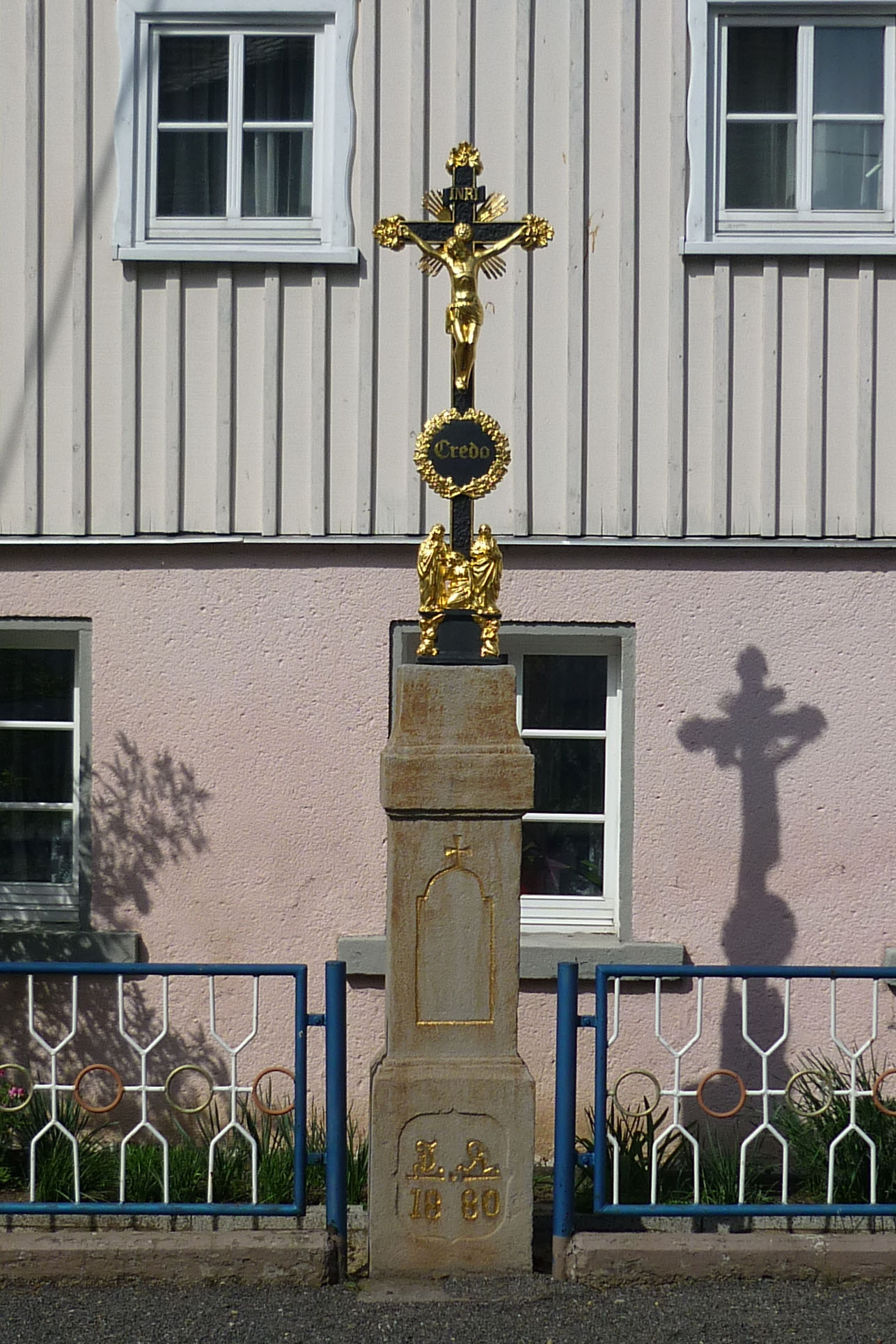 Wegkreuz in Schönau, Reichenstr.